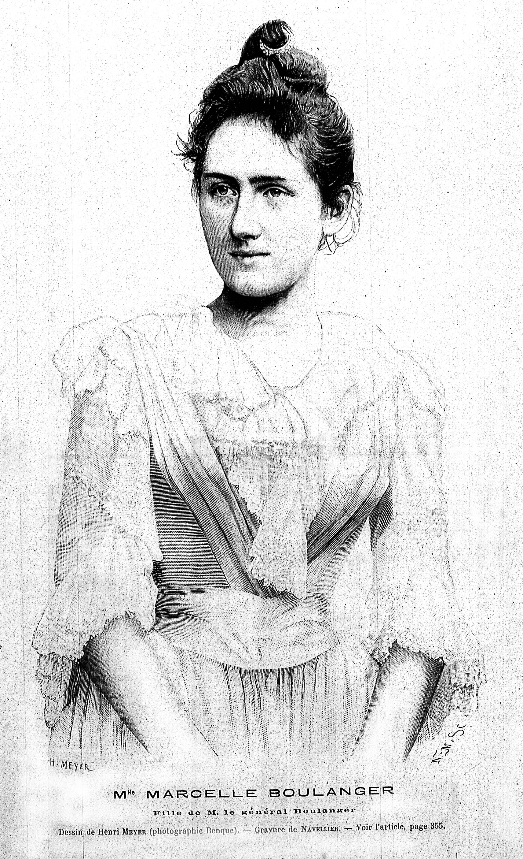 issu du fond de la bibliothèque de reims.